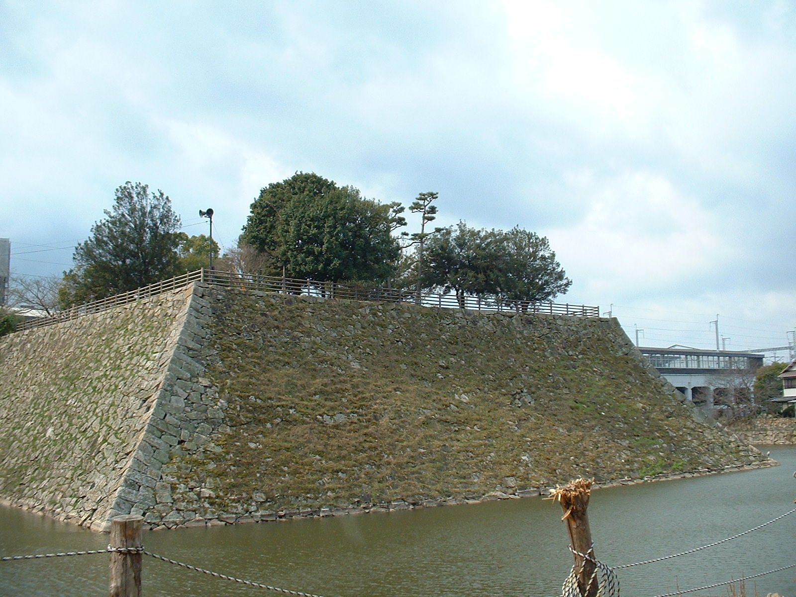 2006年3月30日に投稿者が撮影 Mihara Castle, Mihara, Hiroshima, Japan